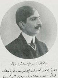 Sadayı Millet baş muharriri, maktul Ahmet Samim Bey.